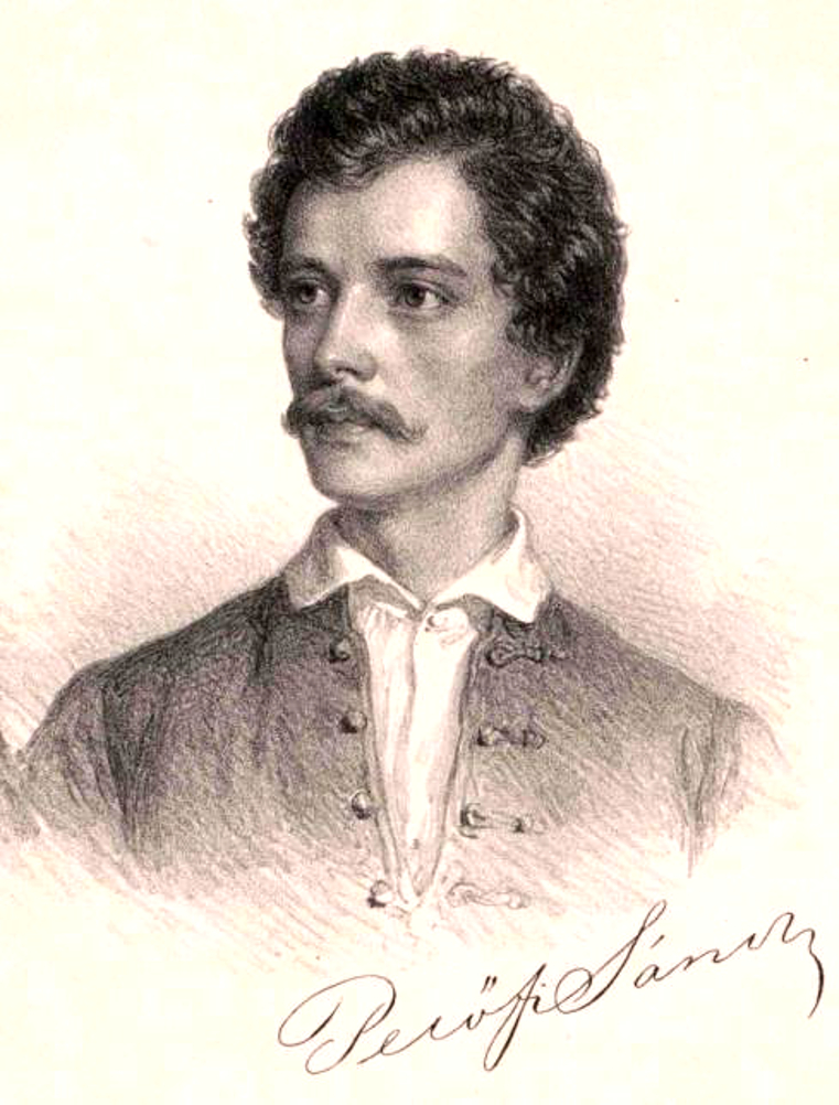 Petőfi Sándor magyar költő